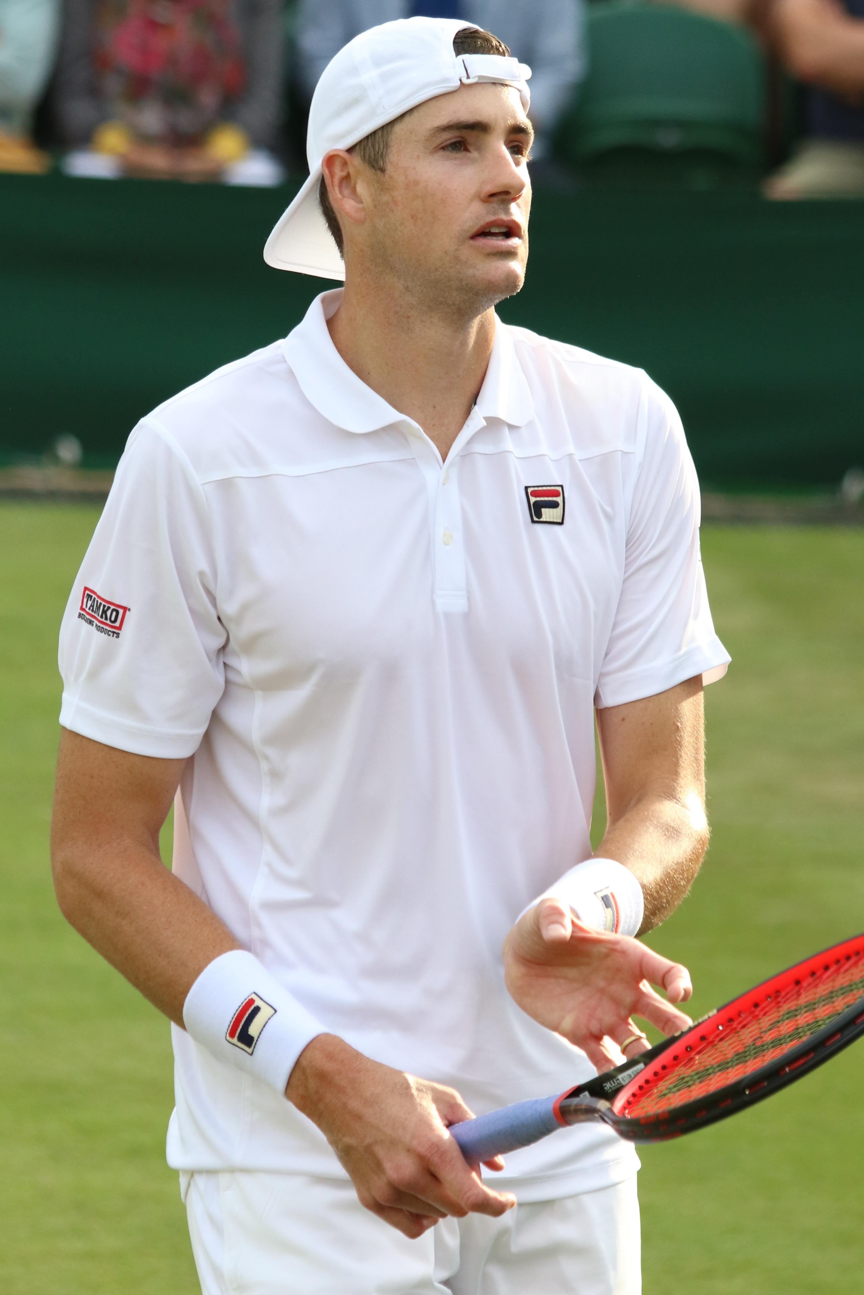 Isner WM19 (18)